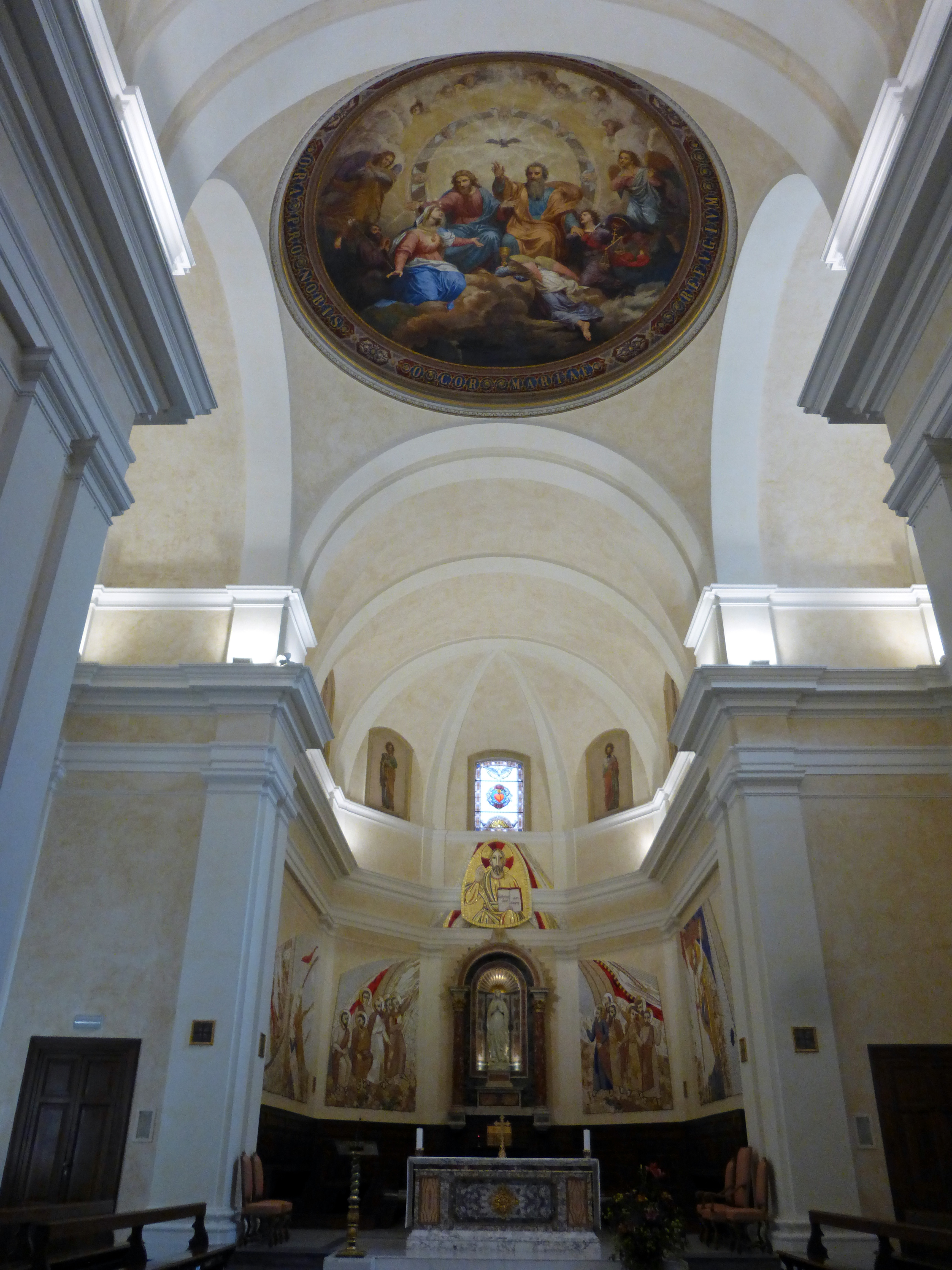 Roma, S. Chiara, interno